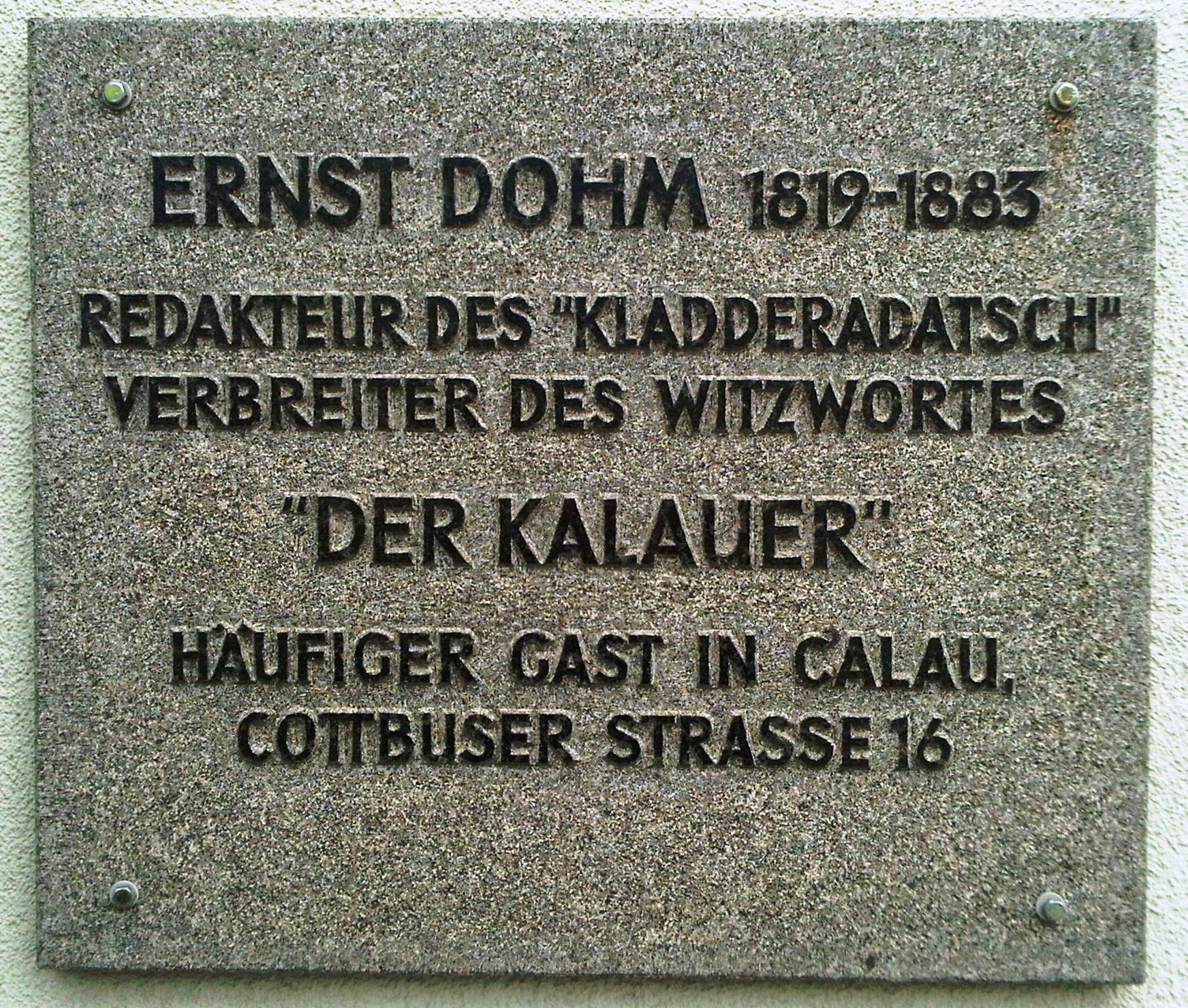 Gedenktafel an Ernst Dohm am Haus der Cottbuser Straße 16 in Calau, Kleinstadt im Landkreis Oberspreewald-Lausitz in Brandenburg